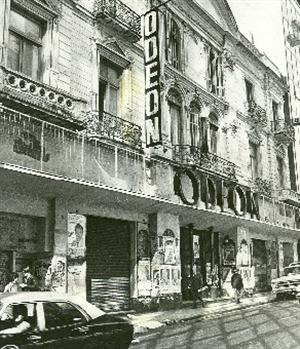 Vista del deteriorado Teatro Odeón hacia 1985, en la calle Esmeralda de Buenos Aires. Demolido en 1991.